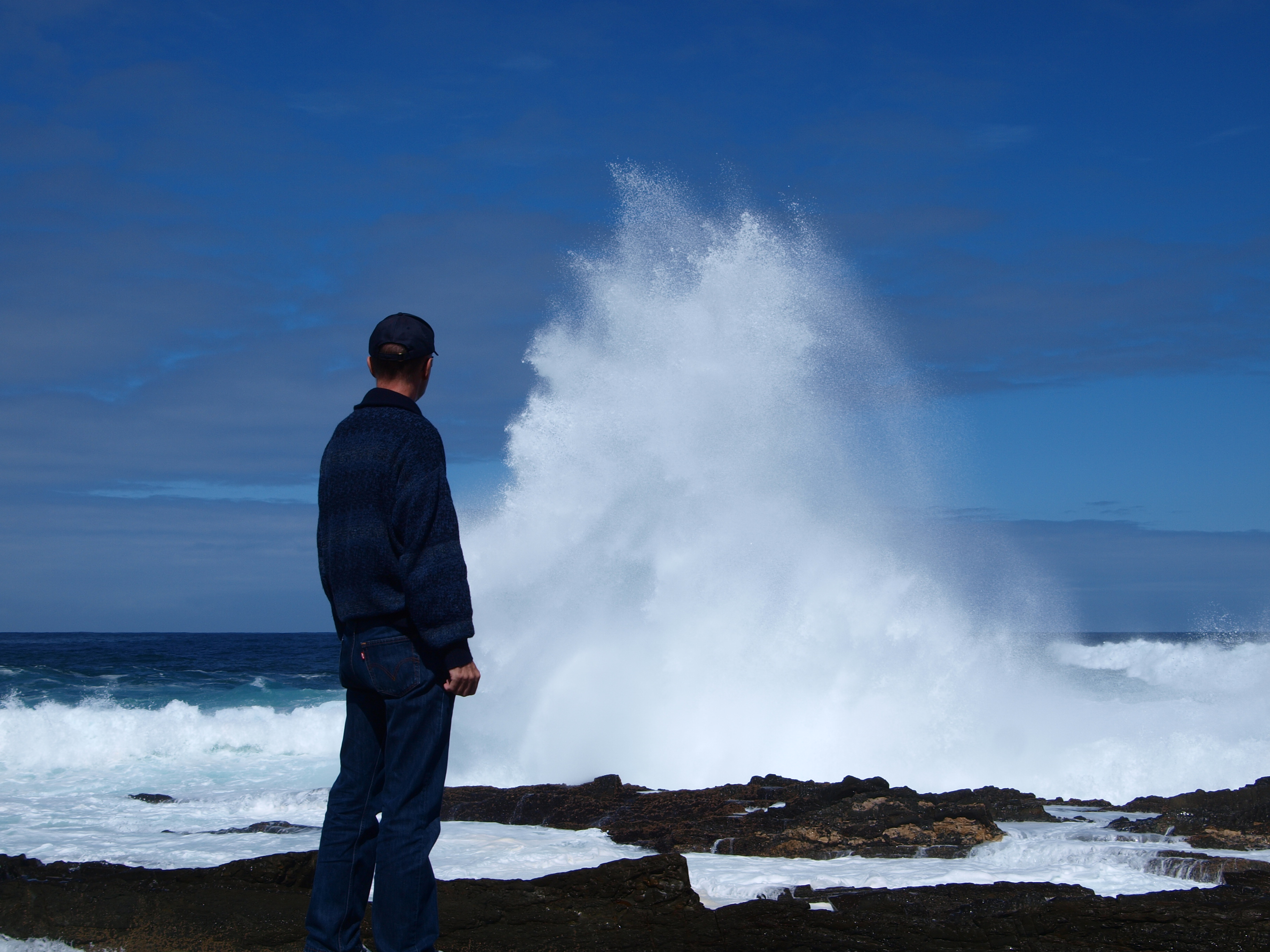 Mit ungeahnter Kraft schlagen die Wellen auf die Felsen.